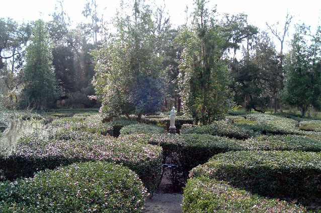 Maze at Magnolia Gardens, Magnolia Plantation, South Carolina.